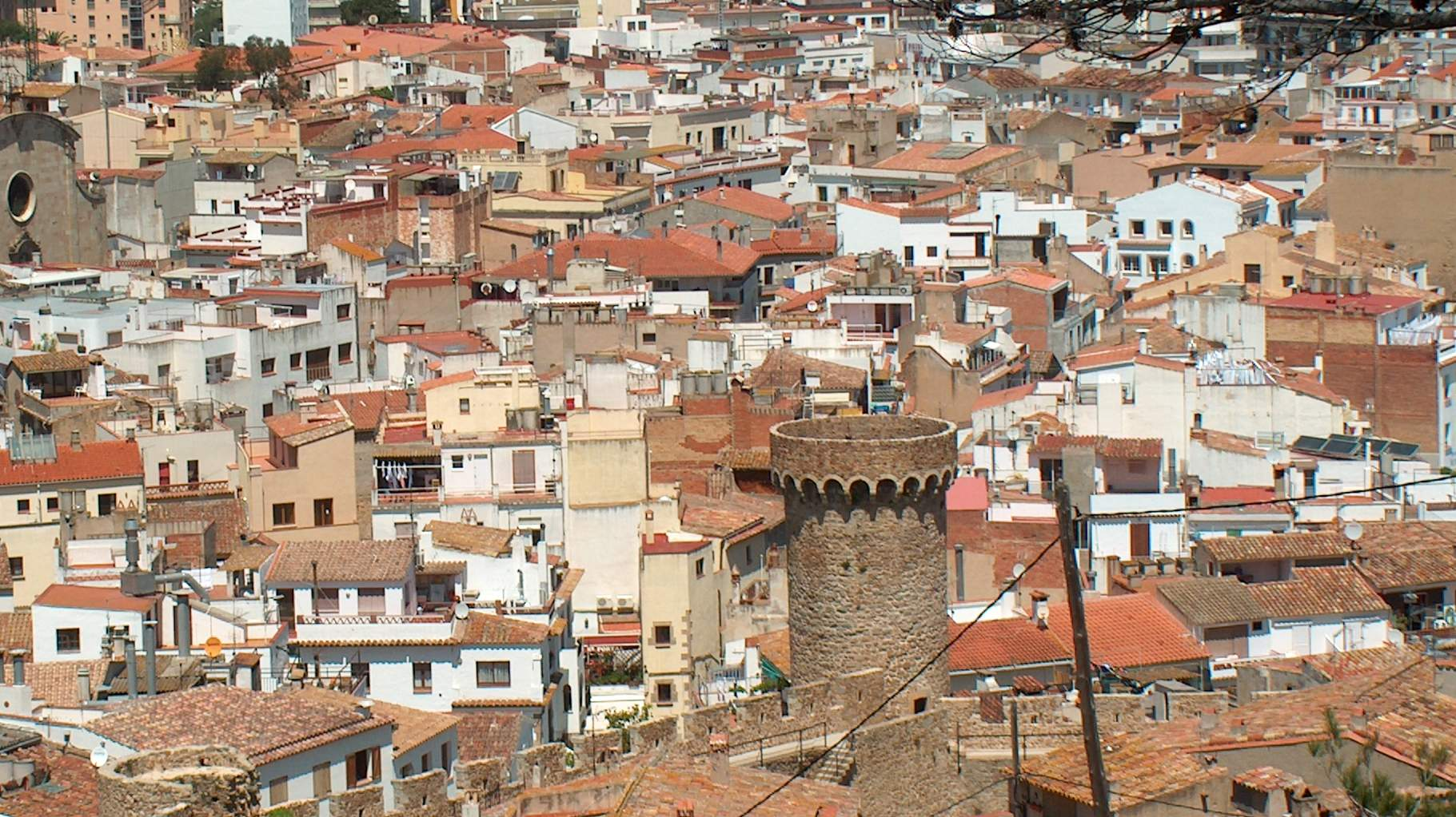 Marco en Antoinette, Tossa de Mar 2005, een heerlijke vakantie. Tossa de Mar een fantastisch gezellige plaats aan de Costa Brava. Marco en Antoinette van Lieshout, zie ook